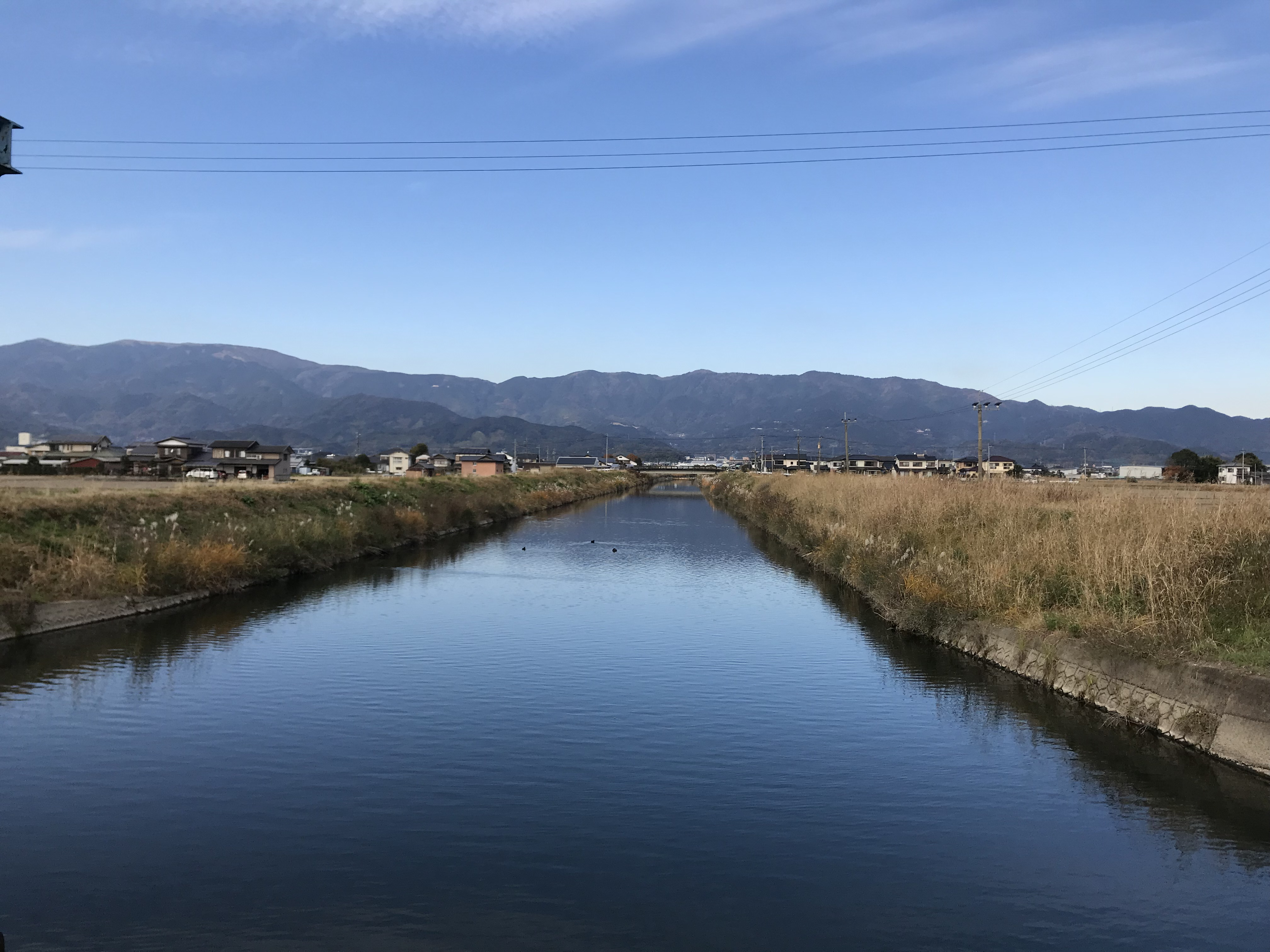 勝水門より望む牛津江川(上流側)